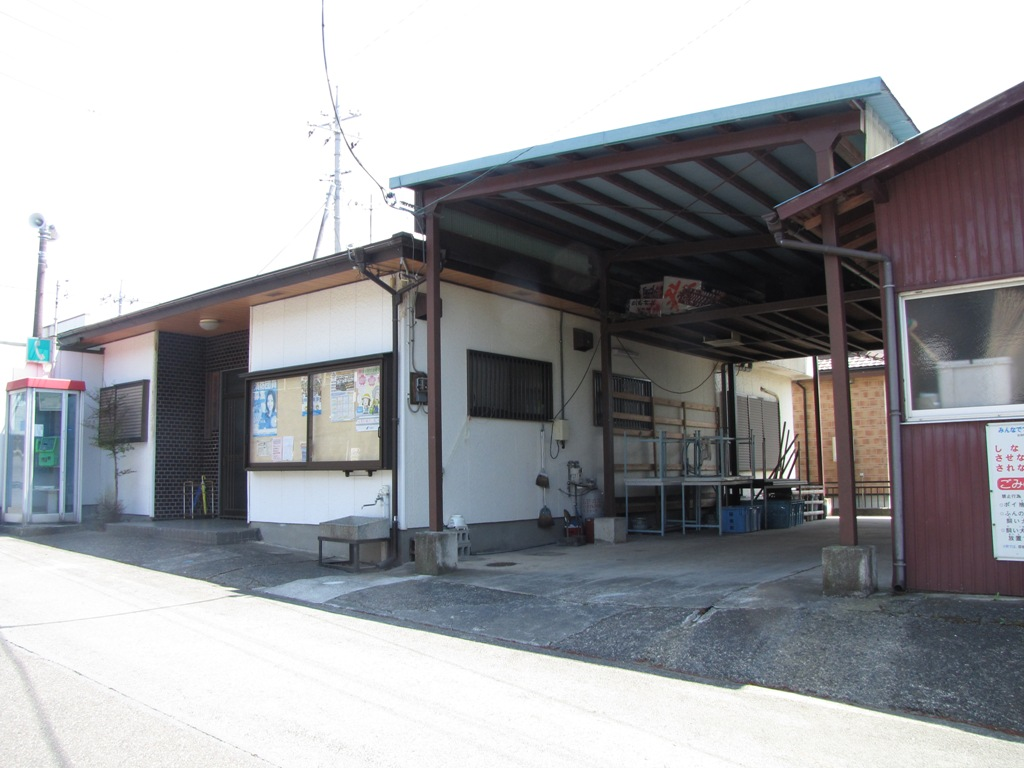 静岡県田方郡函南町上沢にある、新幹線公民館。